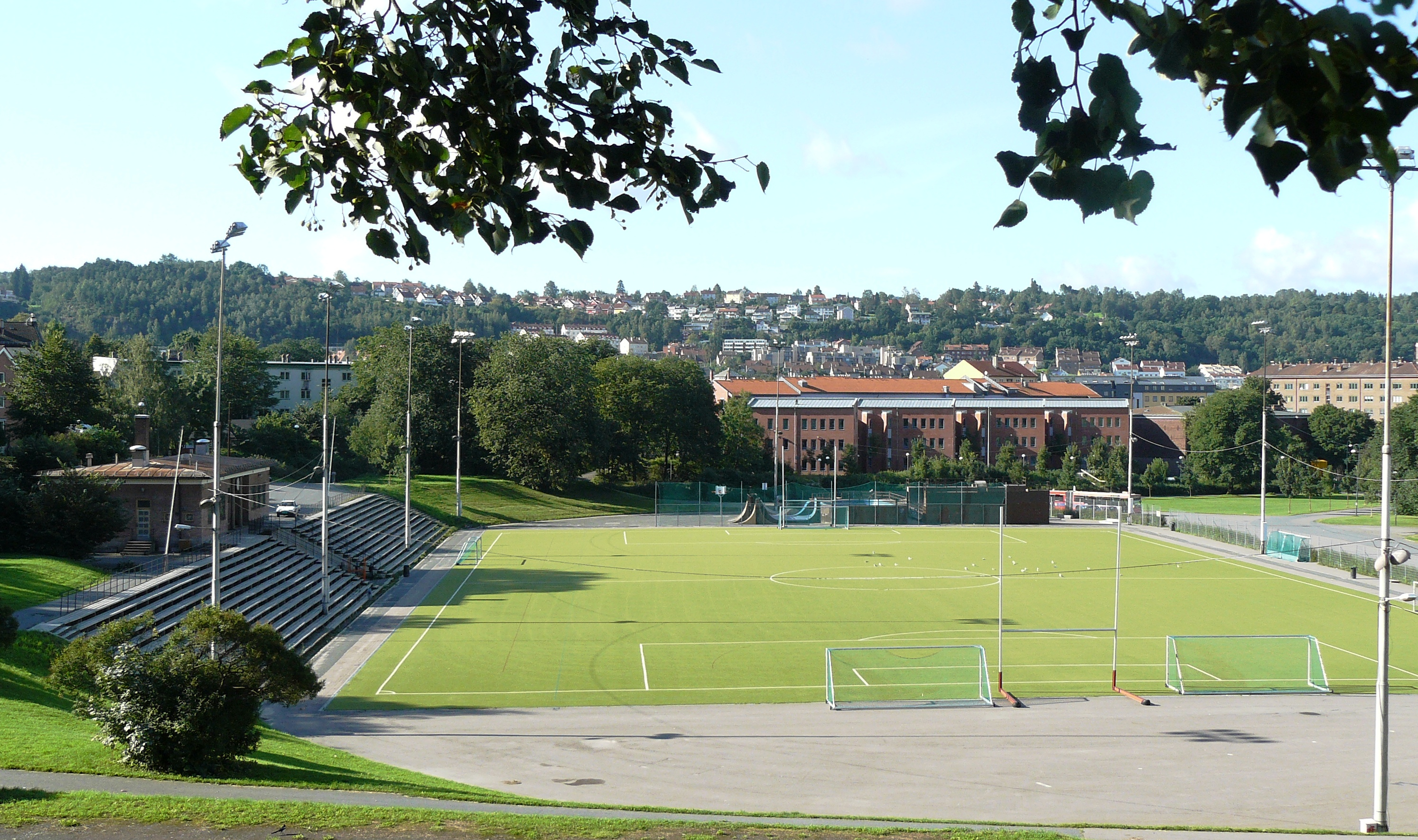 Jordal idrettsplass, Oslo